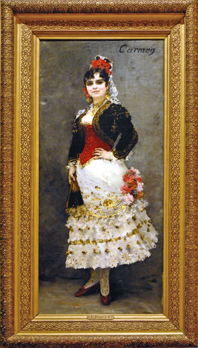 Mademoiselle Célestine Galli-Marié dans le rôle de Carmen par Henri Lucien Doucet 1886 Peinture à l'huile sur toile Tableau réalisé en Italie L'opéra Carmen de Georges Bizet a été représenté à l'Opéra pour la première fois en 1875. livret de Prosper Mérimée Bibliothèque-Musée de l'Opéra de Paris